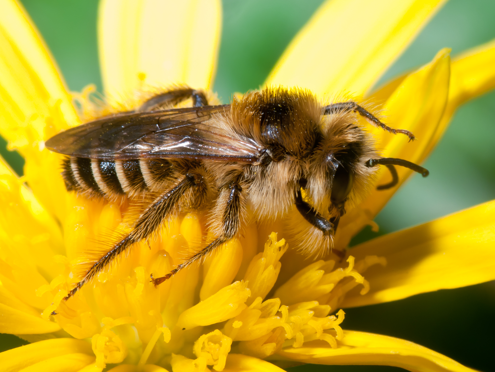 Abella en Brión, Galicia (Spain)